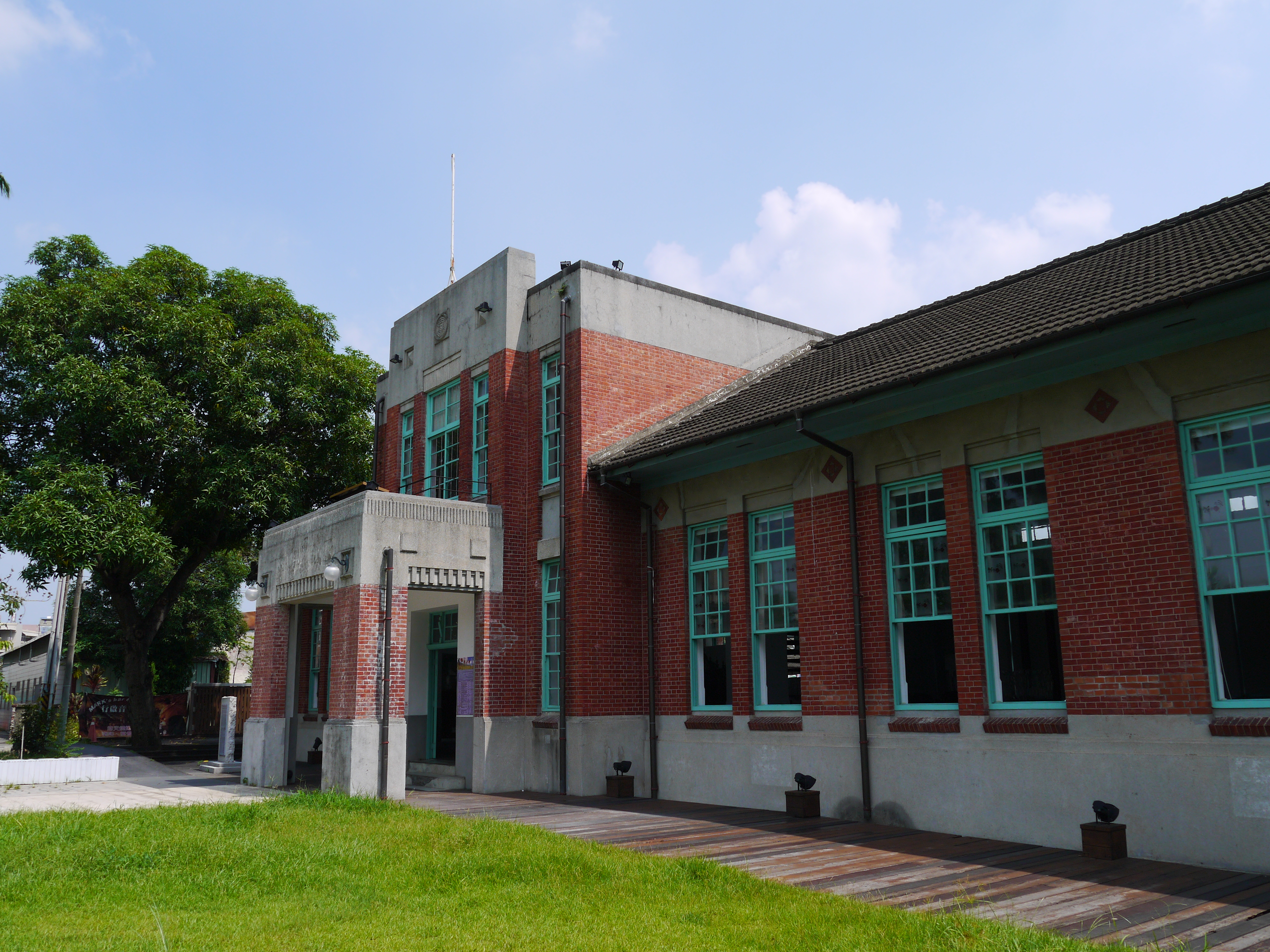 斗六行啟記念館